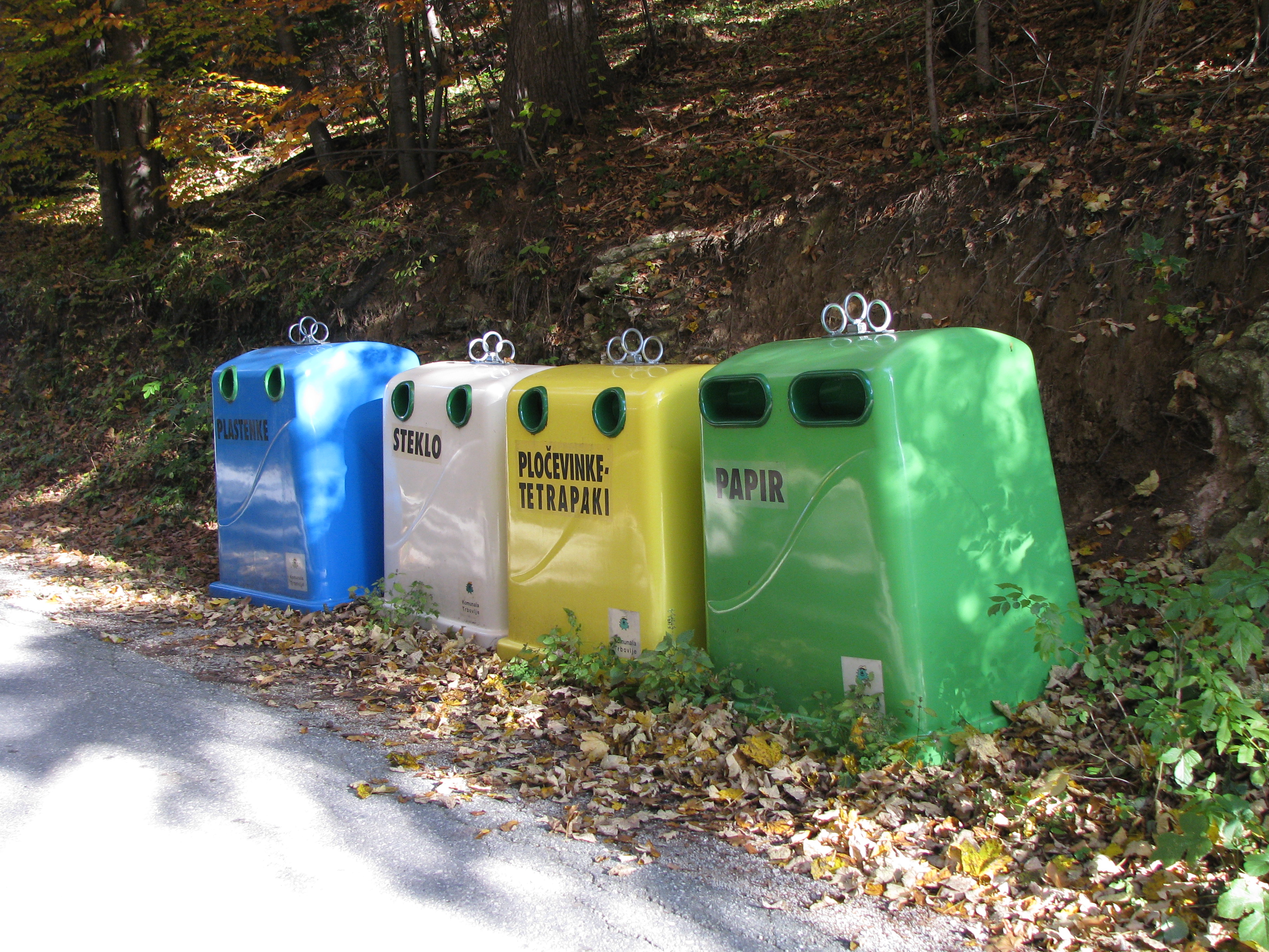 Zaboji za recikliranje v bližini Završja (občina Trbovlje)